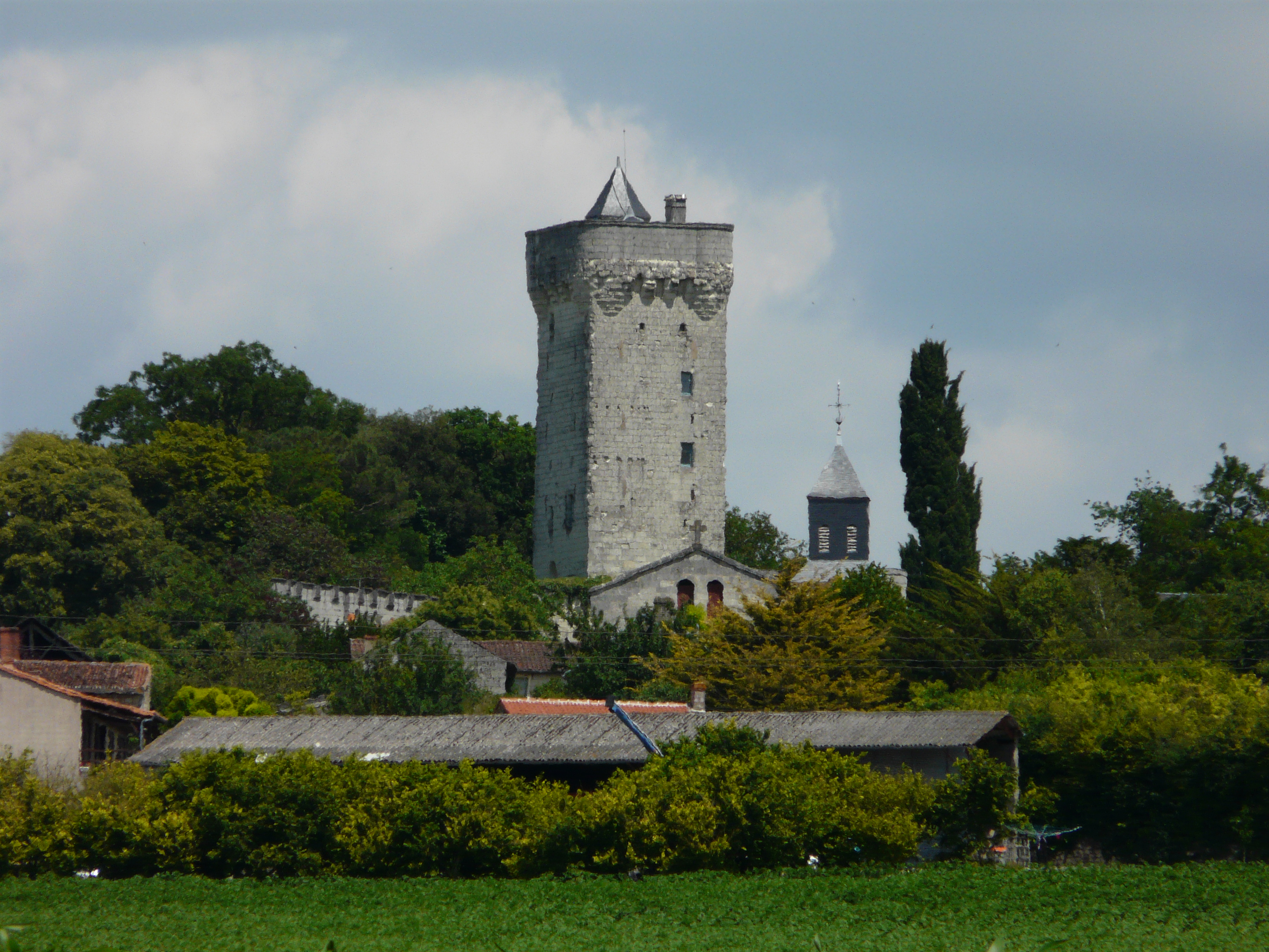 Le donjon et le clocher de l'église Sainte-Catherine, Curçay-sur-Dive, Vienne, France